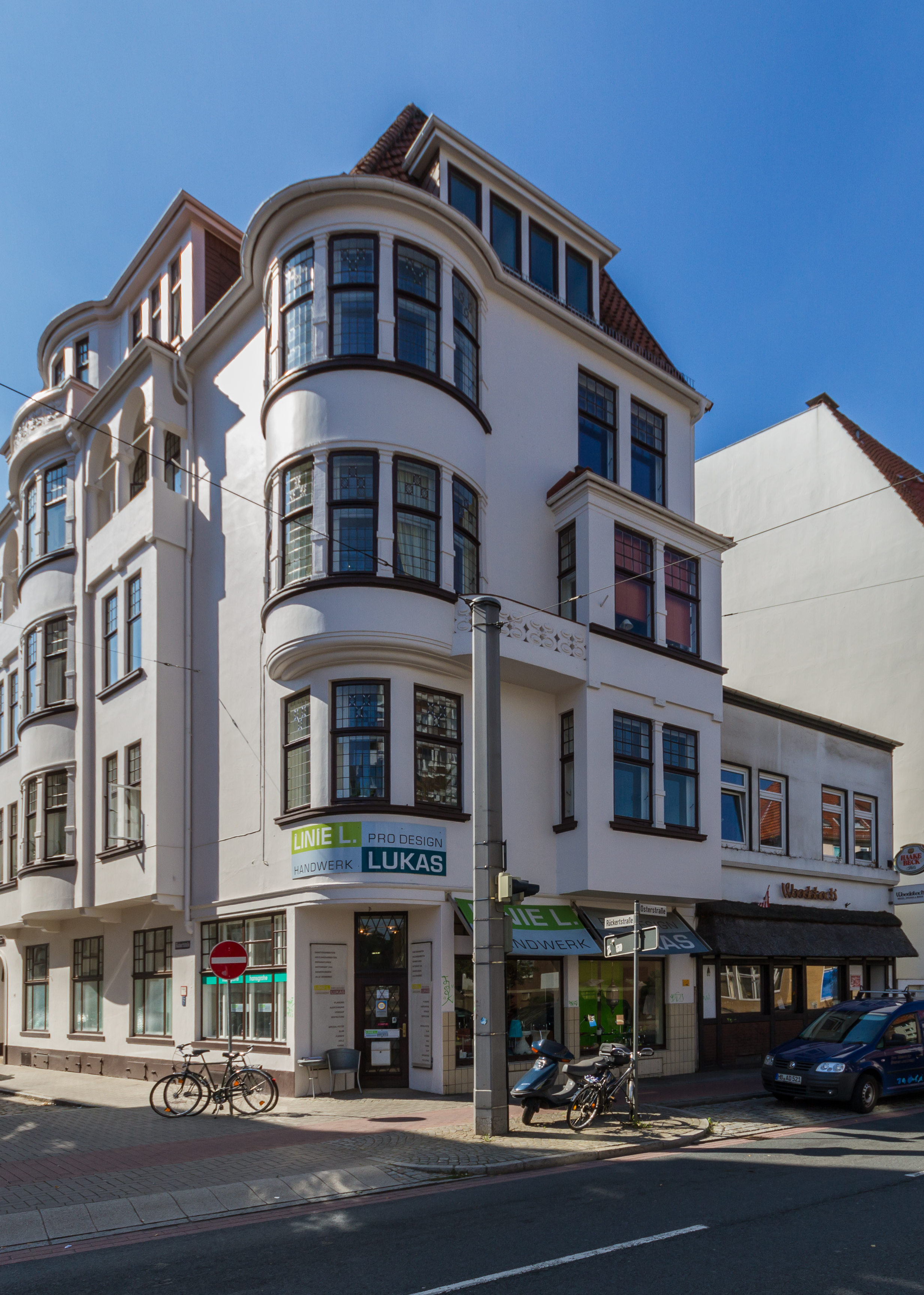 Wohnhaus in Bremen, Rückertstraße 1Die Denkmalgruppe ist ein geschütztes Kulturdenkmal in der Freien Hansestadt Bremen, mit der Nr. 0278 beim Landesamt für Denkmalpflege registriert.